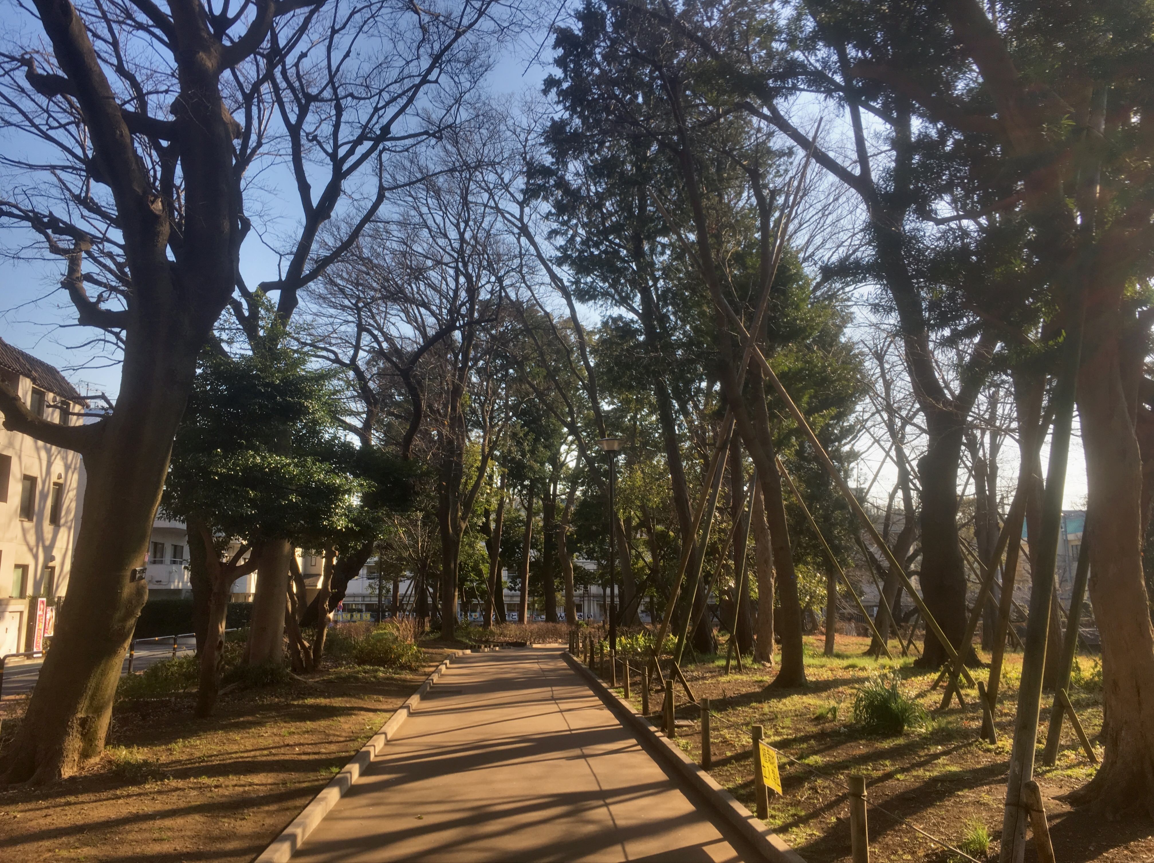 文庫の森 (Bunko no Mori Park)